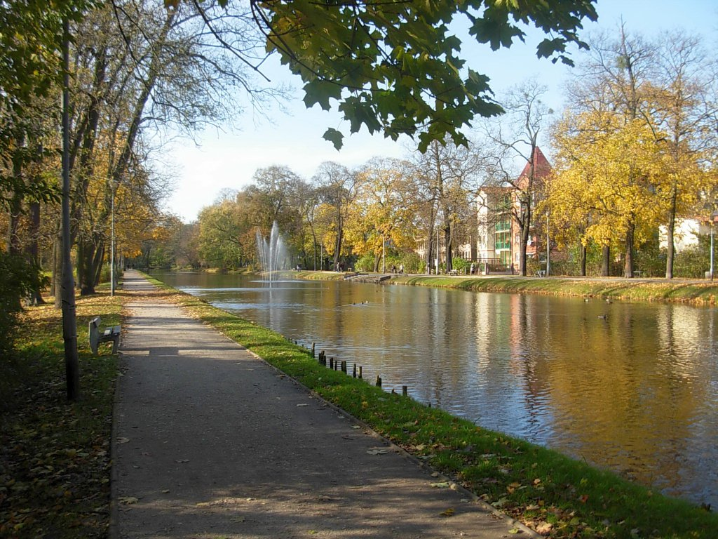 Planty nad Kanałem Bydgoskim